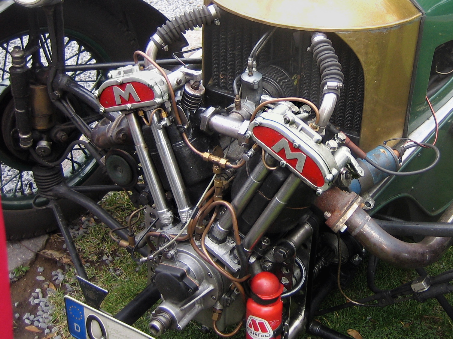 Morgan Threewheeler mit wassergekühltem Matchless-Motor